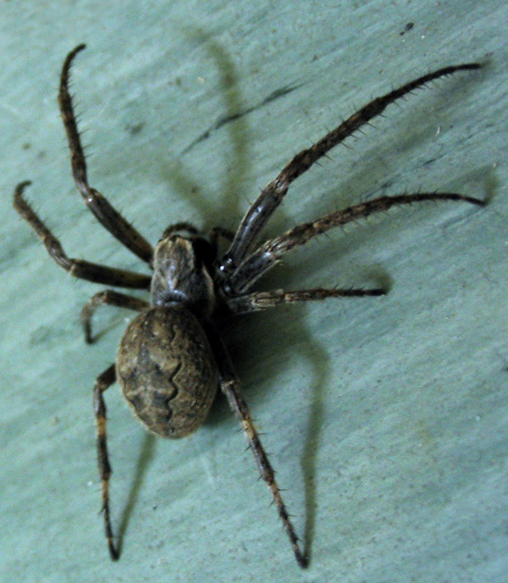 Nuctenea umbricata